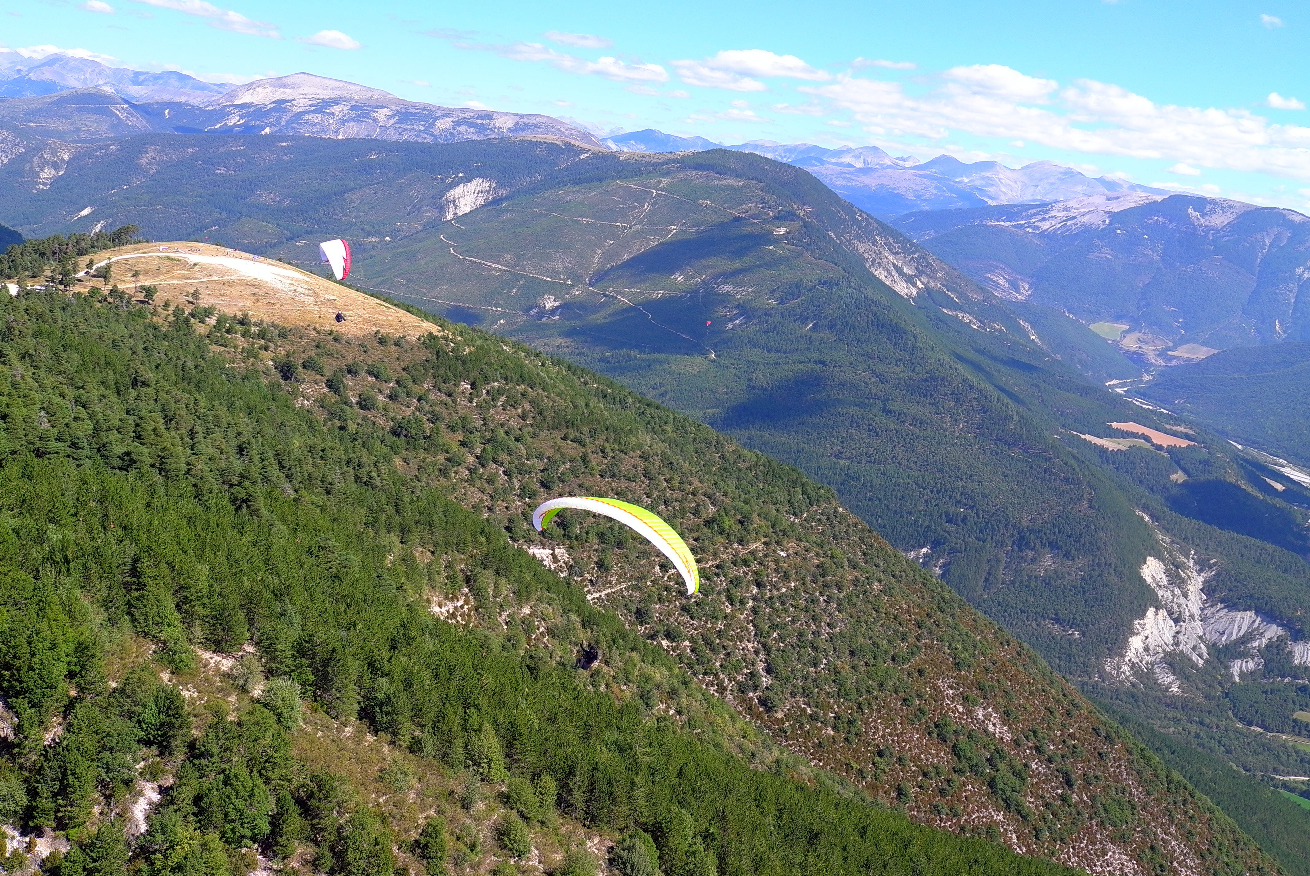 Décollage Saint André Les Alpes